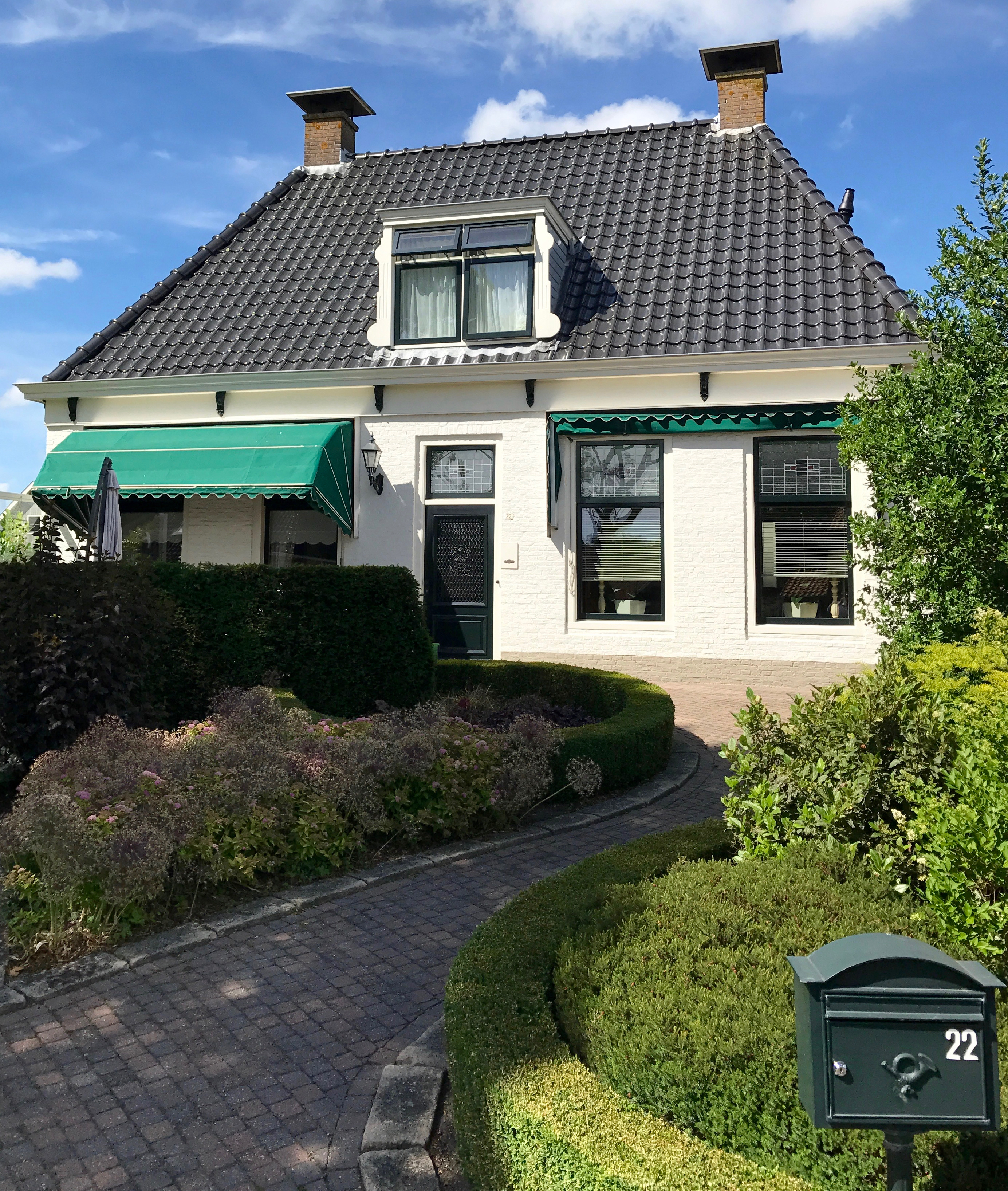 Harlingerstraatweg 22